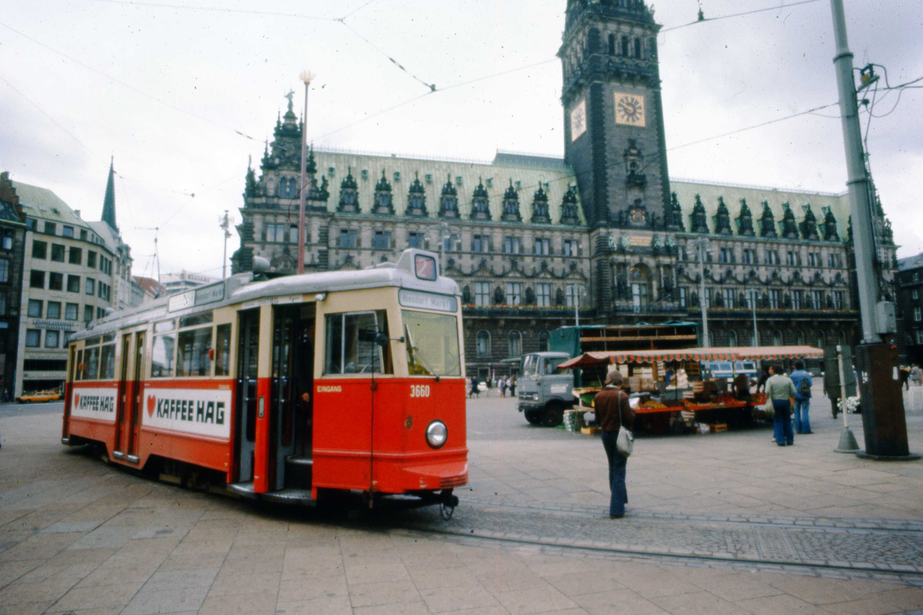 Straßenbahn auf dem Rathausmarkt Hamburg